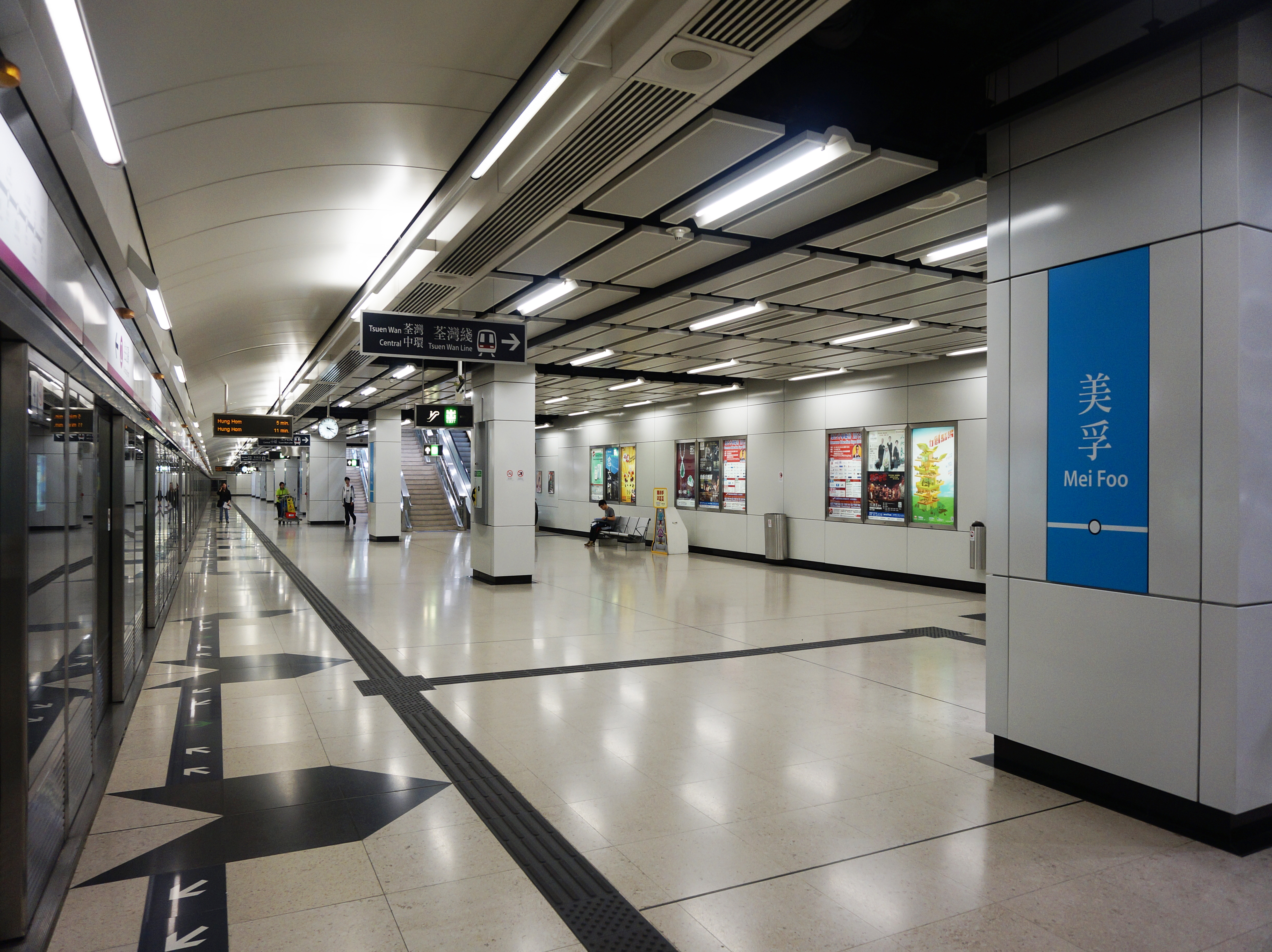 港鐵美孚站西鐵線月台